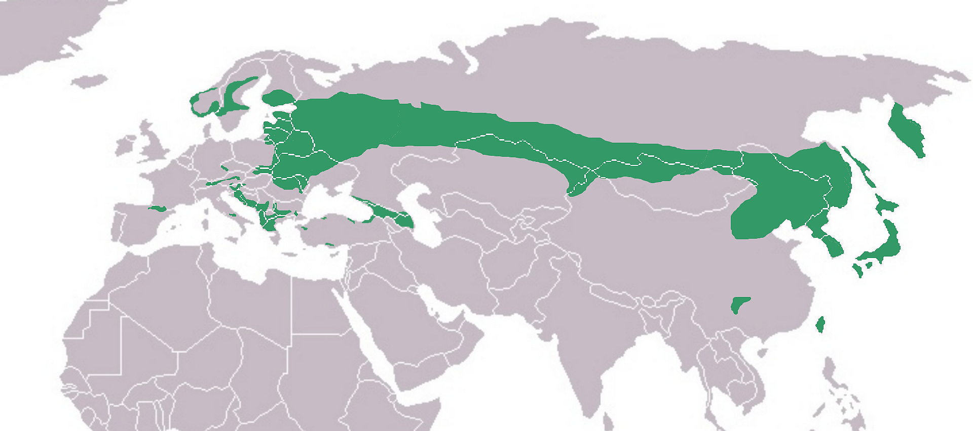 Verbreitungsgebiet des Weißrückenspechtes